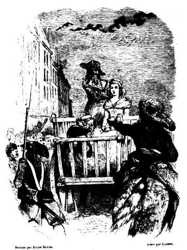 Charrette de conddamnés en route pour la place de la Révolution (ici pour l'artiste: Marie-Antoinette)